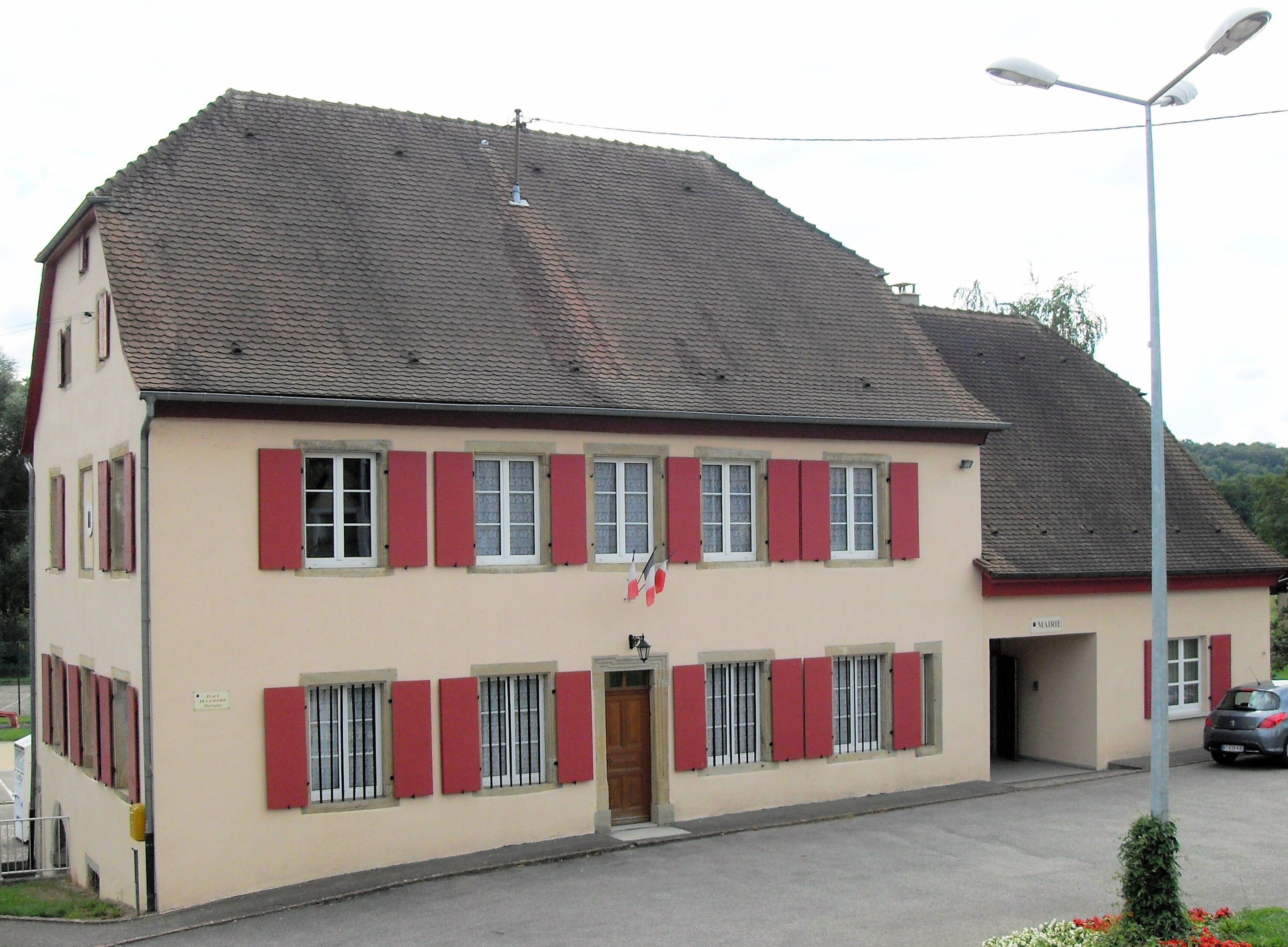 La mairie de Bettendorf